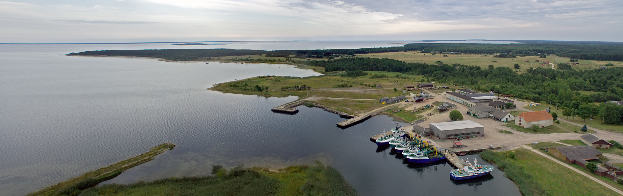 Suuresadama panoraam. 2013